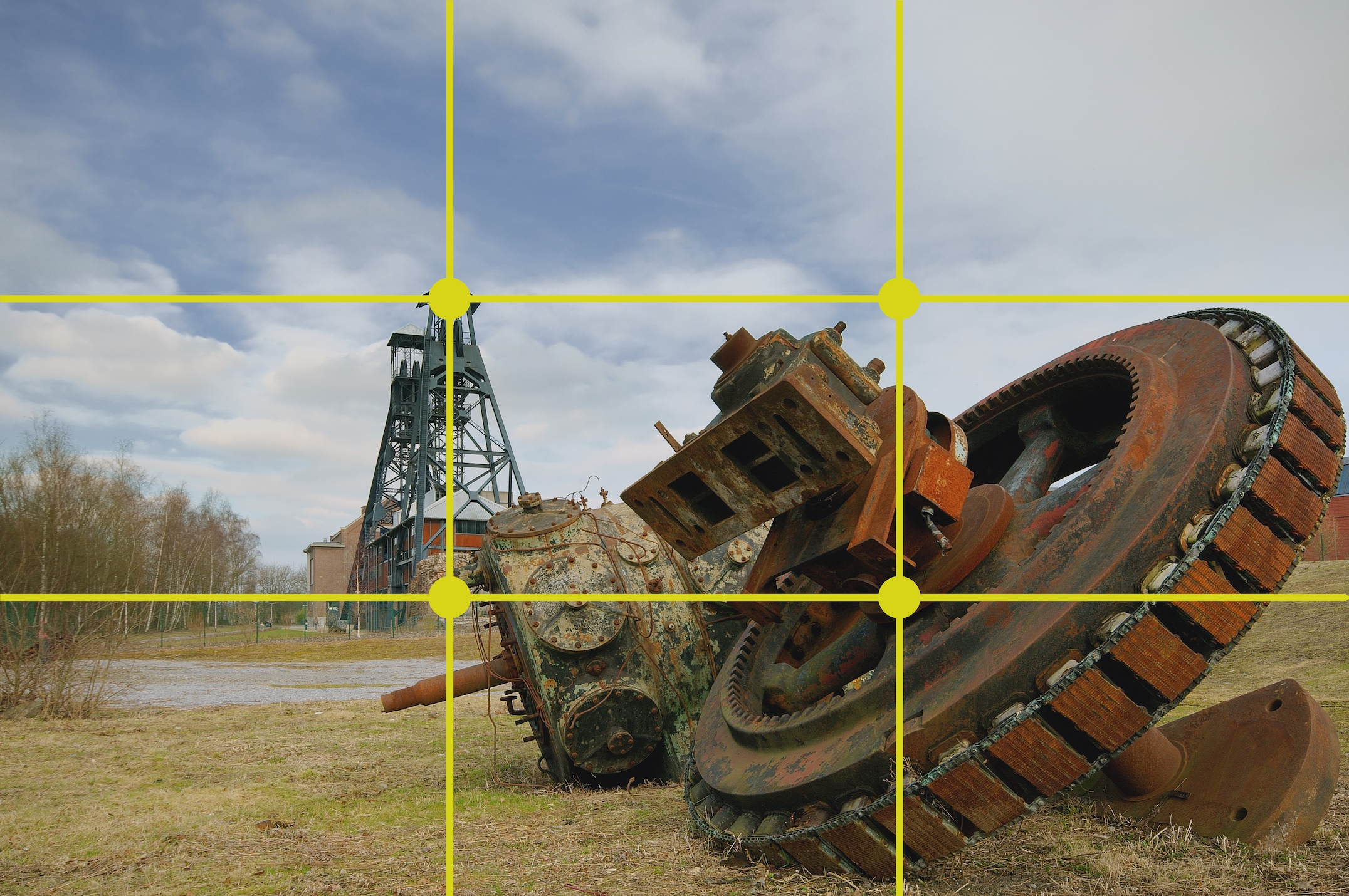 *Sujet:De Site vum Bois du Cazier; e Beispill vun enger Foto, déi op der Drëttel-Reegel baséiert. Source:Foto vum Luc Viatour , Nikon boîtier D300 a Sigma 10-20mm F4,5-5,6-Objektiv, mat Gëlle-Reegel Linne ausstafféiert vum